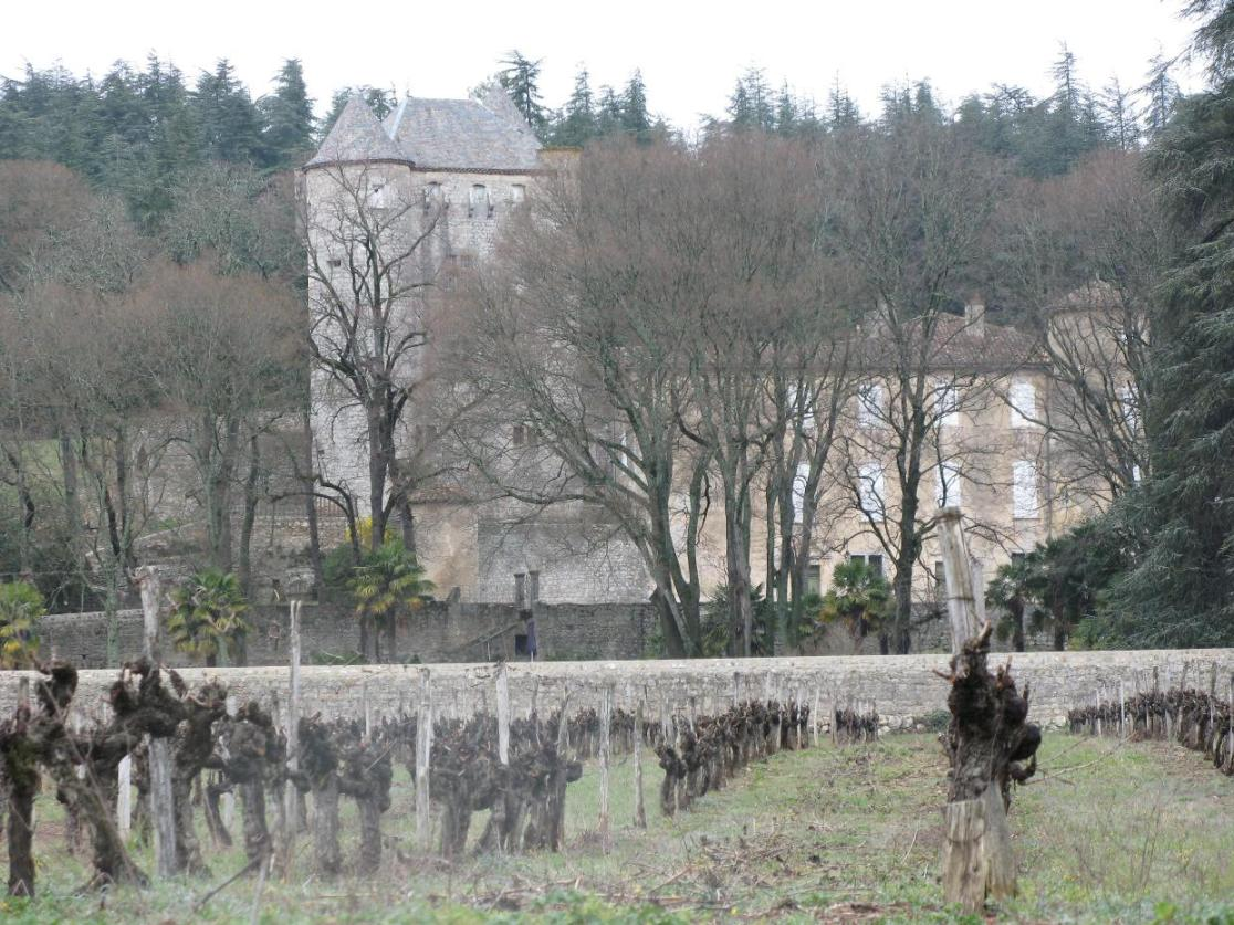 Village de Saint-Alban (Saint-Alban-Auriolles) (Ardèche)